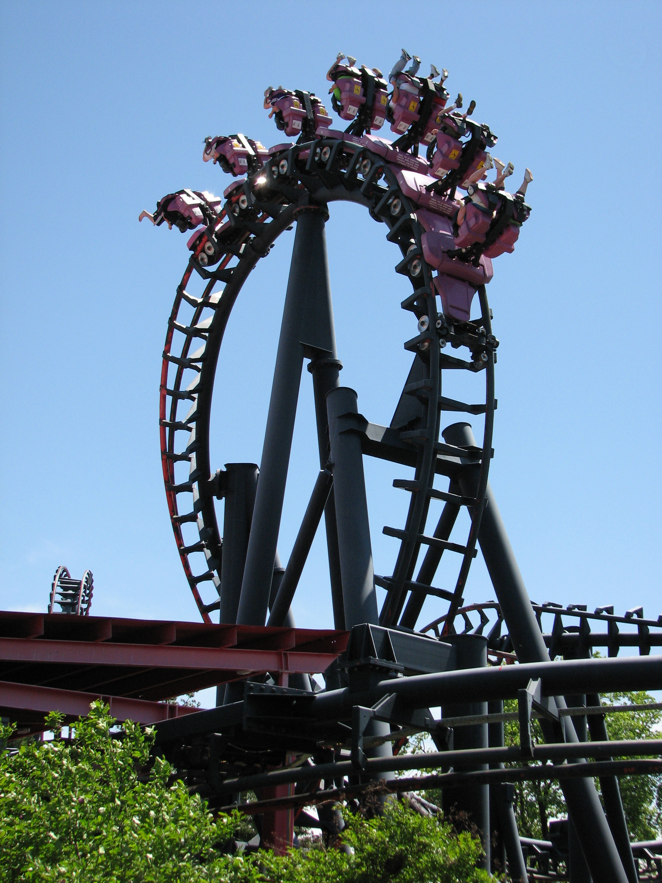 T²